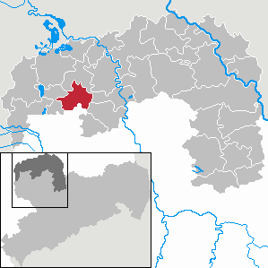 Krostitz in Saxony - Landkreis Nordsachsen